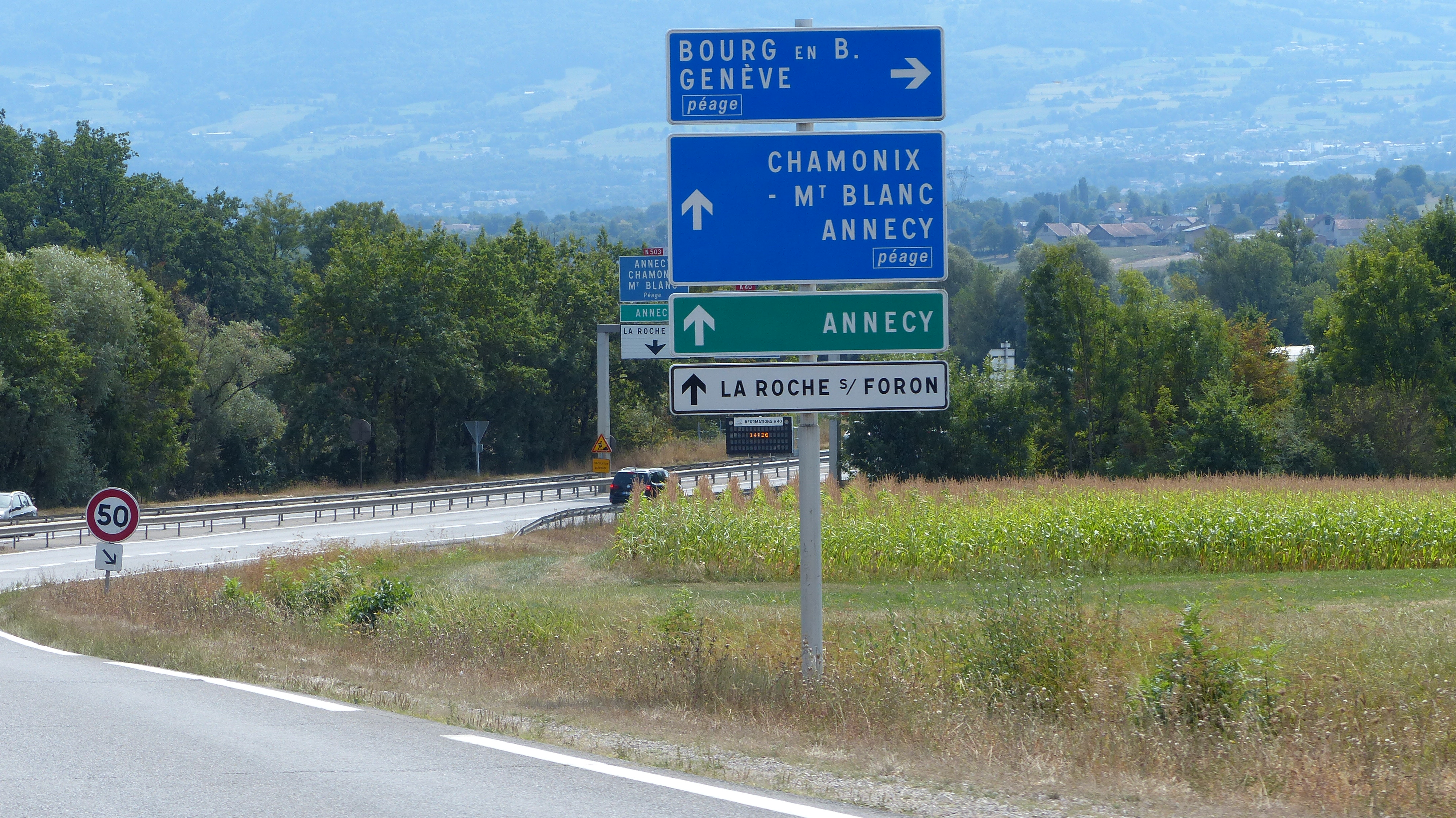 Panneau D43 avec SU5, sur la D903 à Nangy, Haute-Savoie, France.